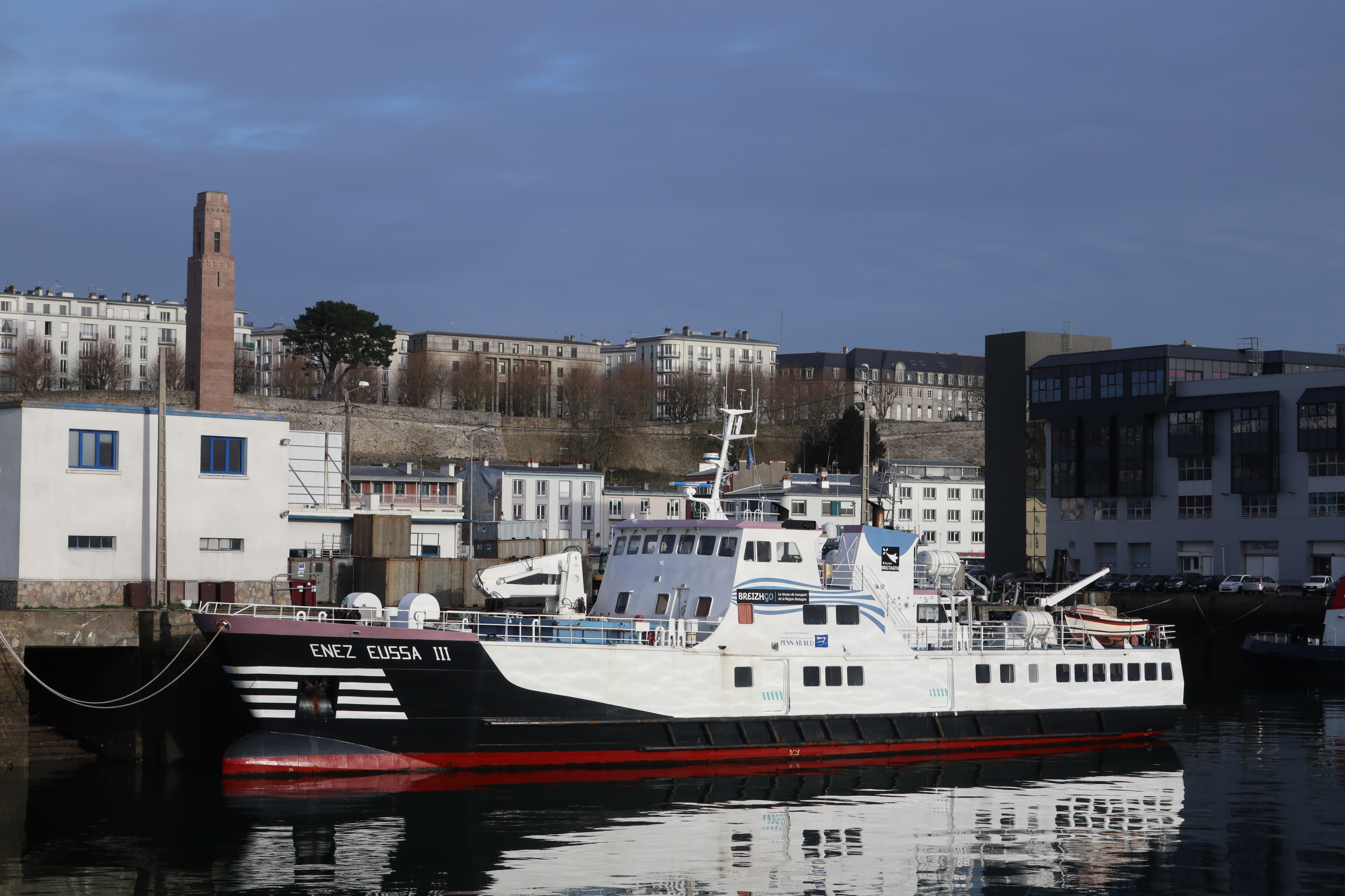 Le bateau Enez Eussa III dans le port de Brest en décembre 2018.